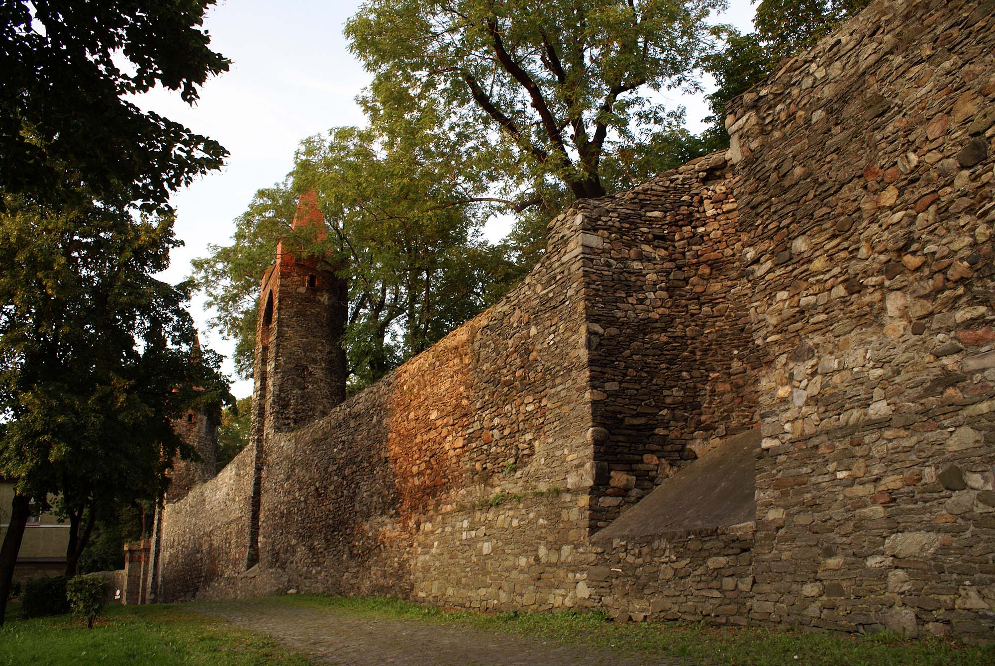 Paczków, Stare Miasto w ramach średniowiecznego założenia